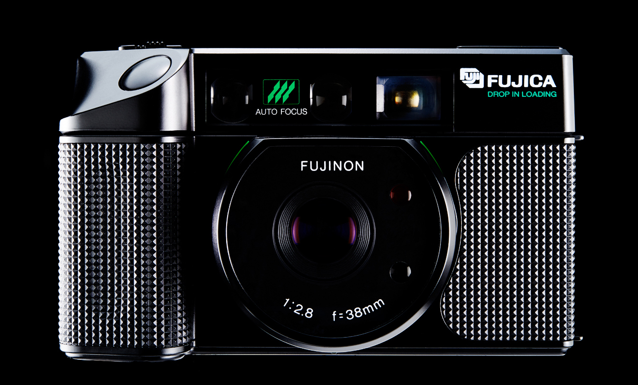 Fuji DL 100 Mario Bellini Design